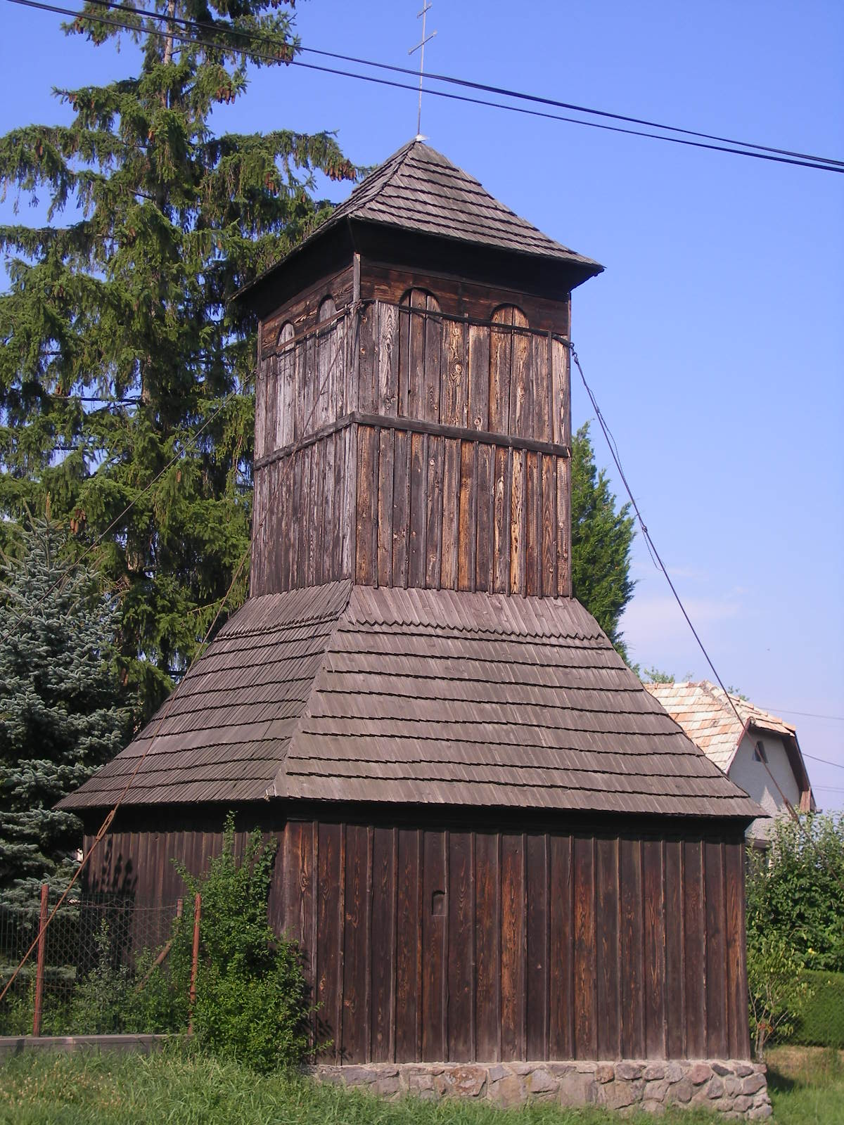 Ipolybalog - harangláb